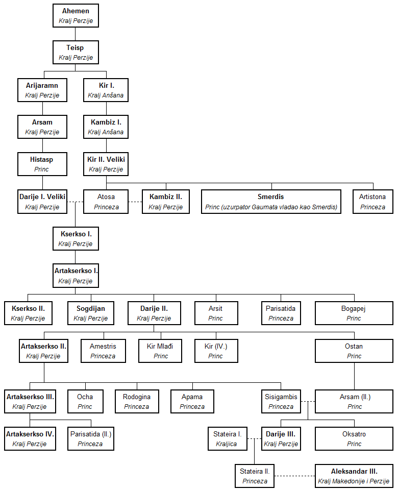 Dopuštenje